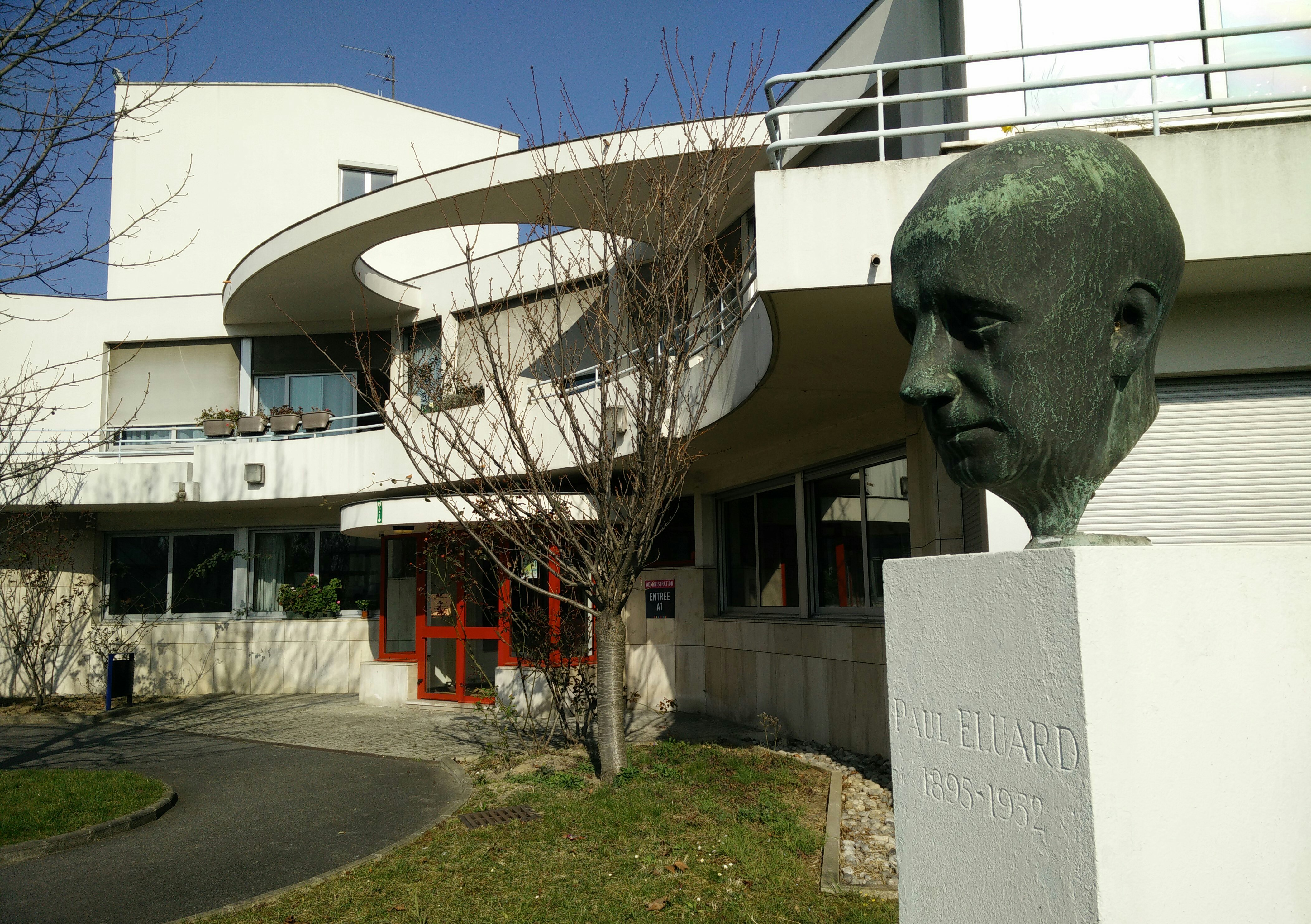 Buste de Paul Eluard réalisé par Françoise Salmon